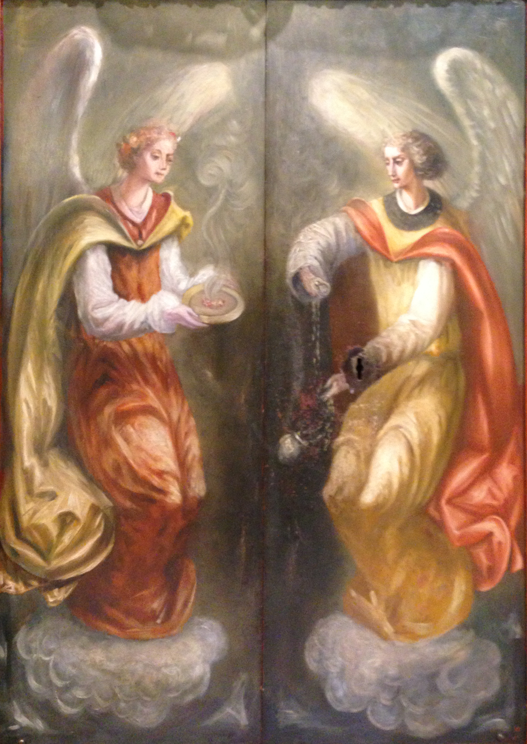 tabernakeldeuren Willibrordkerk Utrecht